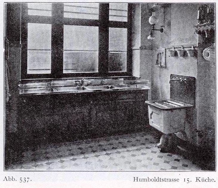 Wohnhaus Humboldtstraße 15 in Düsseldorf, erbaut vor 1904, Architekten Kayser, v. Großheim und Wöhler, Küche.jpg